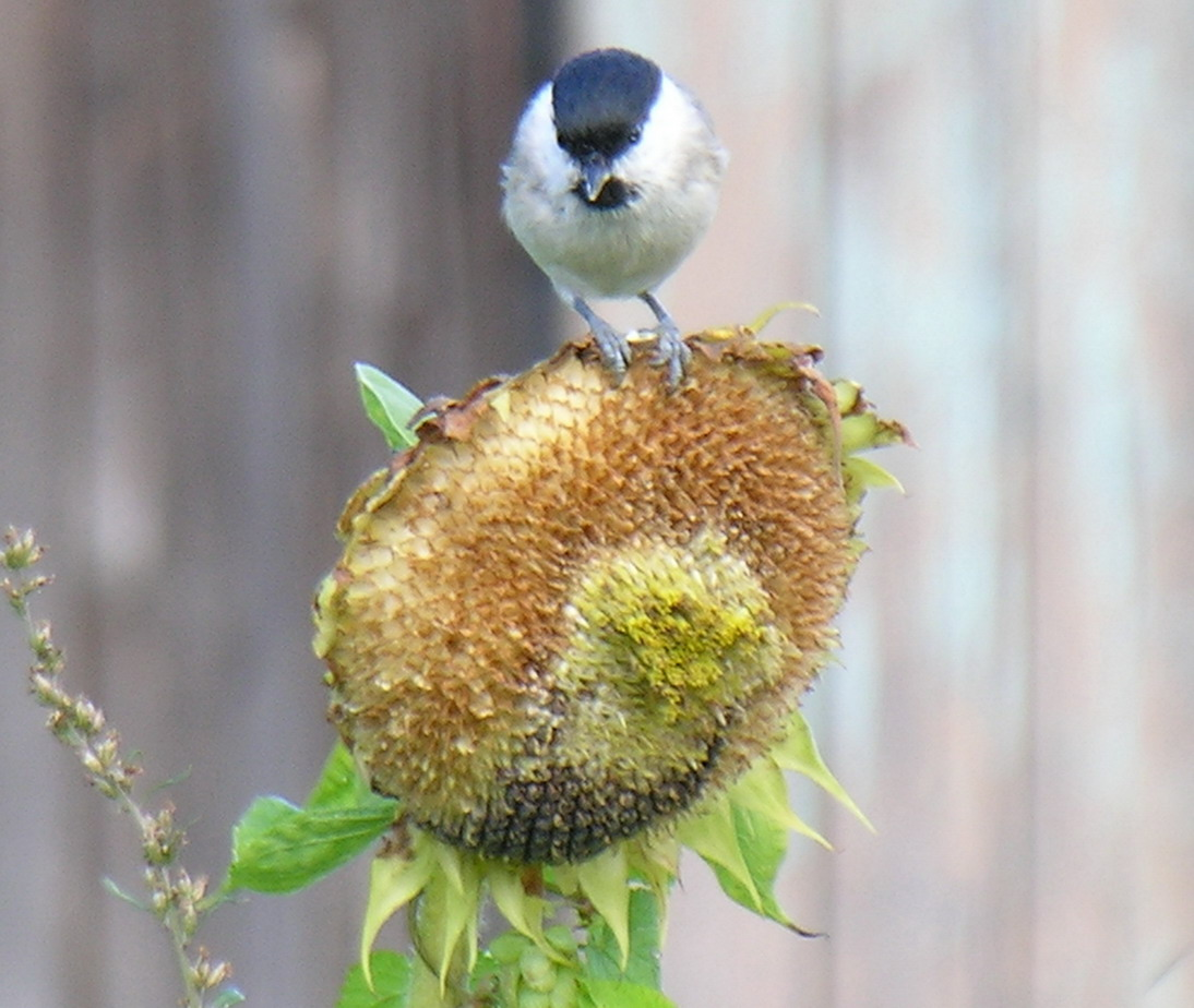 Paprastoji pilkoji zylė (Parus palustris) Foto: Algirdas, 2005 m. rugsėjo 17 d.